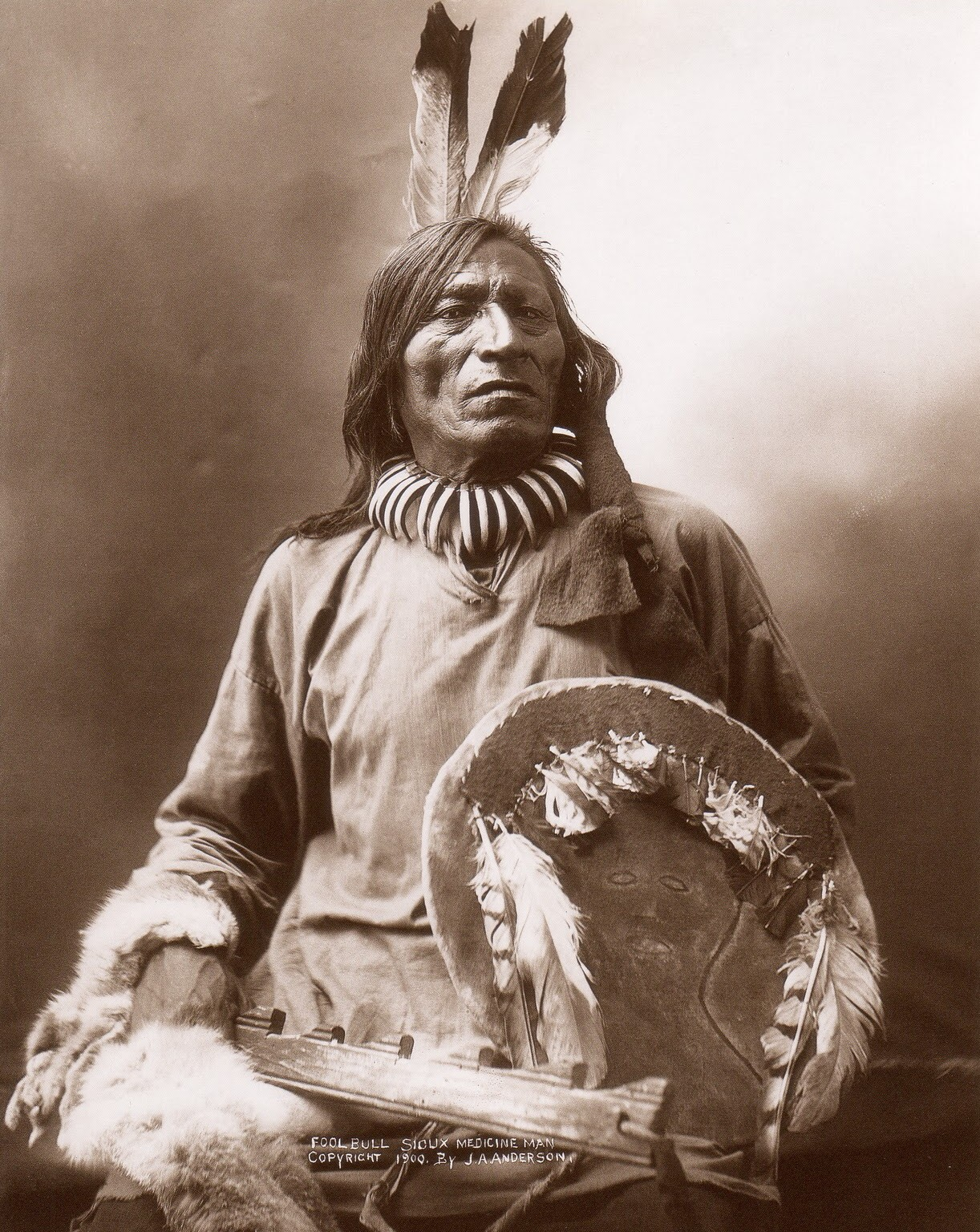 Sioux indianen Fool Bull